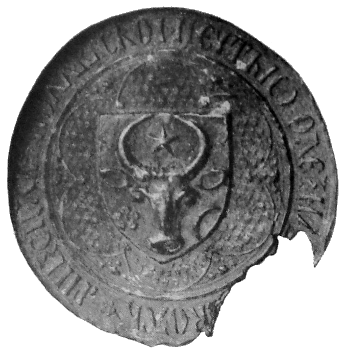 Беларуская (тарашкевіца): Пячатка Аляксандра Добрага, 1400—1432 гг.